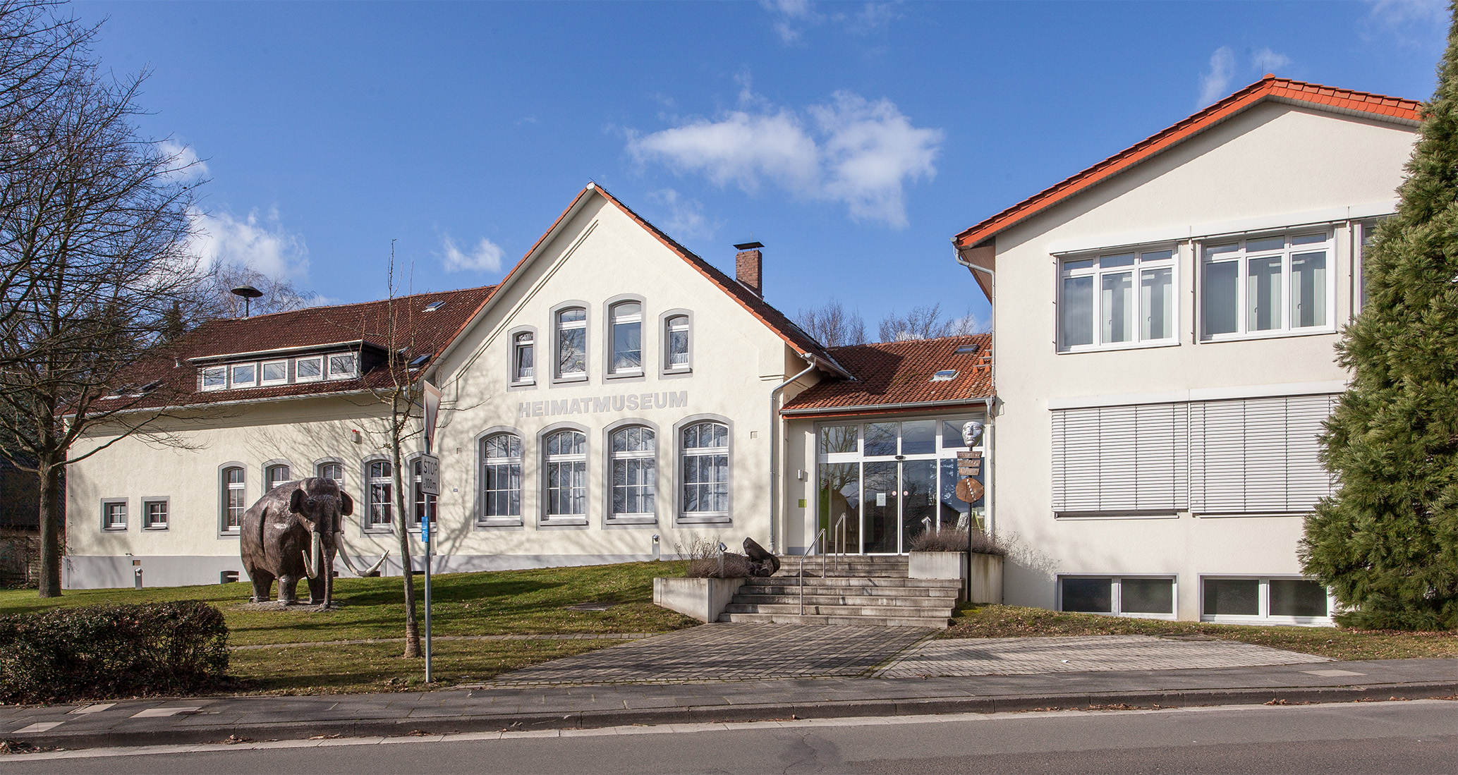 Heimatmuseum Löhne, Stadt Löhne, Kreis Herford, Nordrhein-Westfalen